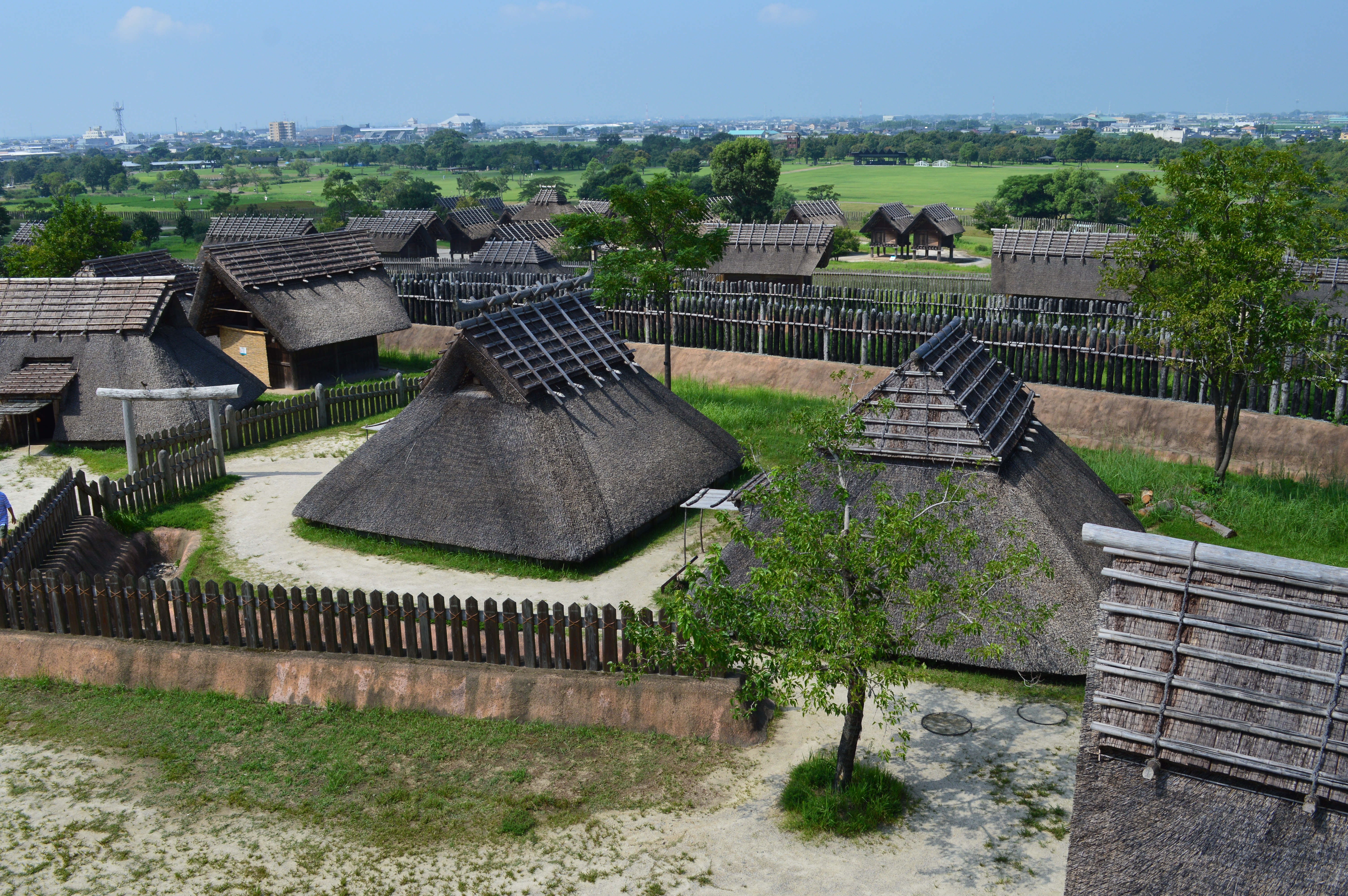 吉野ヶ里遺跡 南内郭 王の家